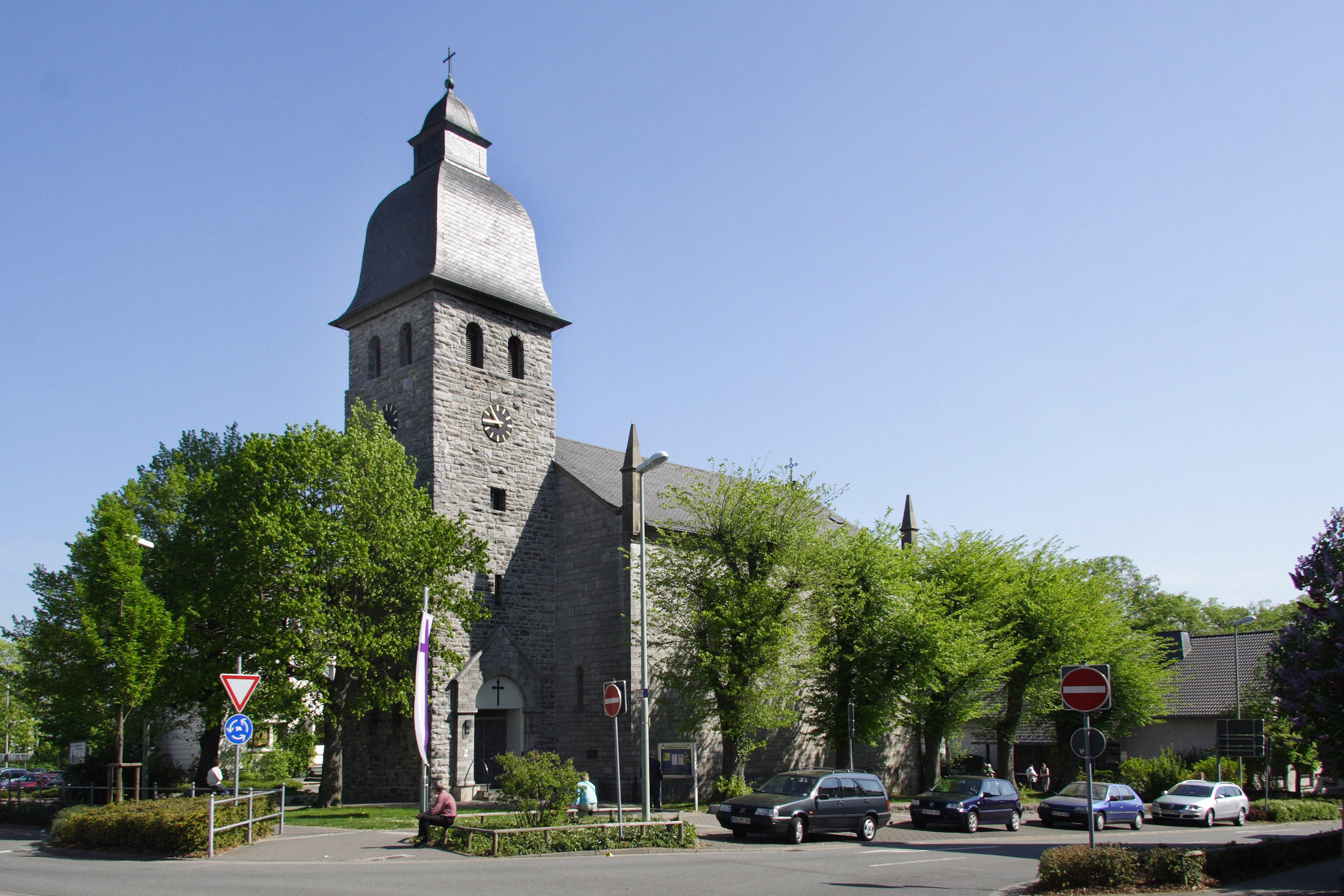 Die evangelische Stadtkirche in Brilon This image shows a heritage building in Germany, located in the North Rhine-Westphalian city Brilon.